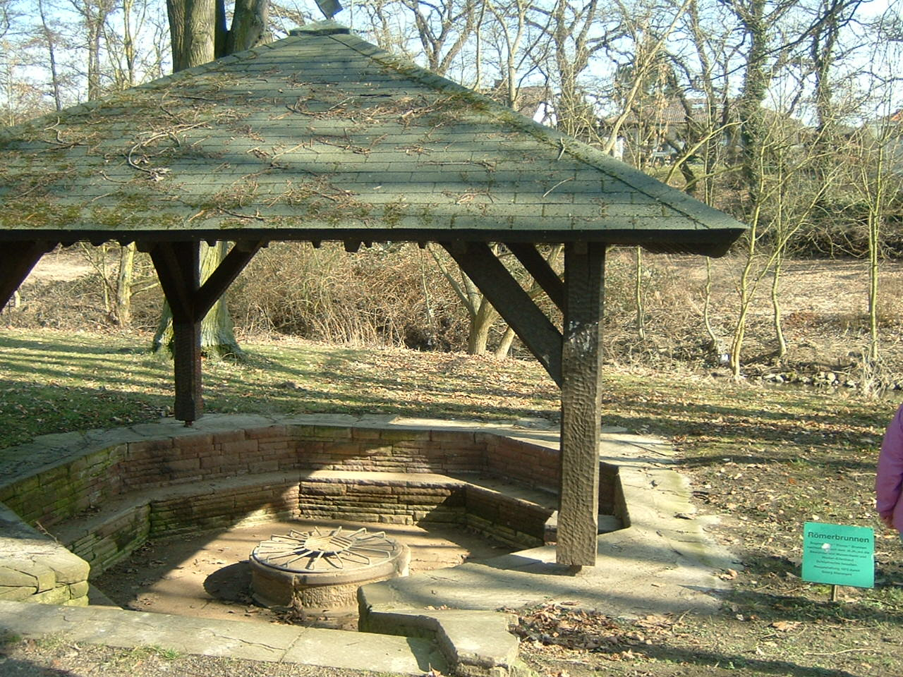 "Römerbrunnen" in Massenheim. Benutzt mindestens seit dem 18. Jahrhundert. Neu 1973 gestaltet von Georg Hieronymi